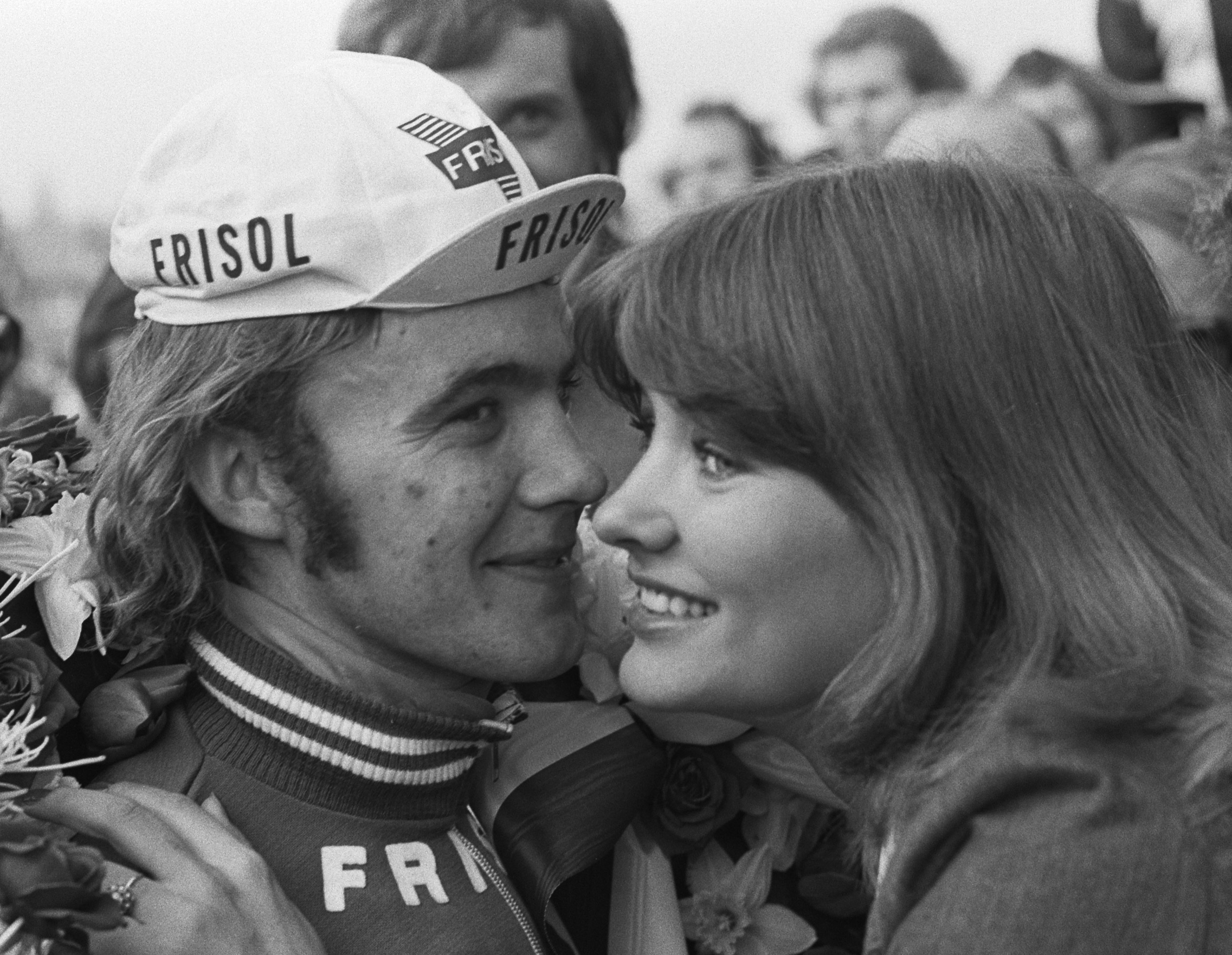 Ronde van Noord Holland ; winnaar Theo Smit (l) krijgt zoen van Miss Europe 1973, Anke Groot